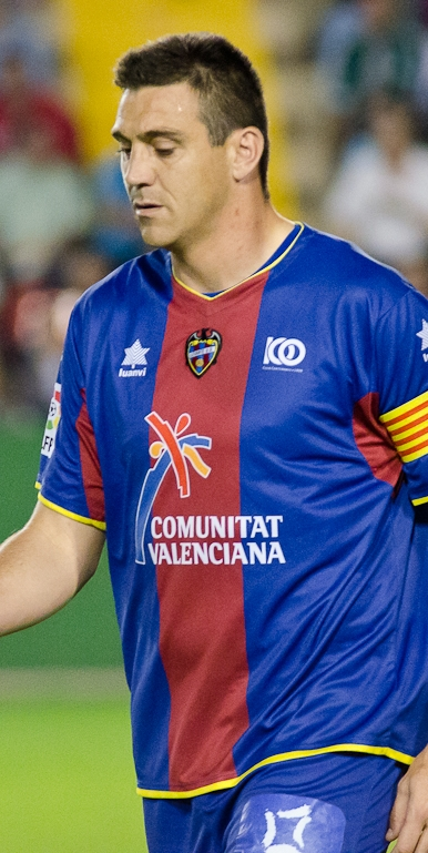 El capità granota Sergio Ballesteros